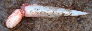 vejiga natatoria de sábalo (un pez de agua dulce)